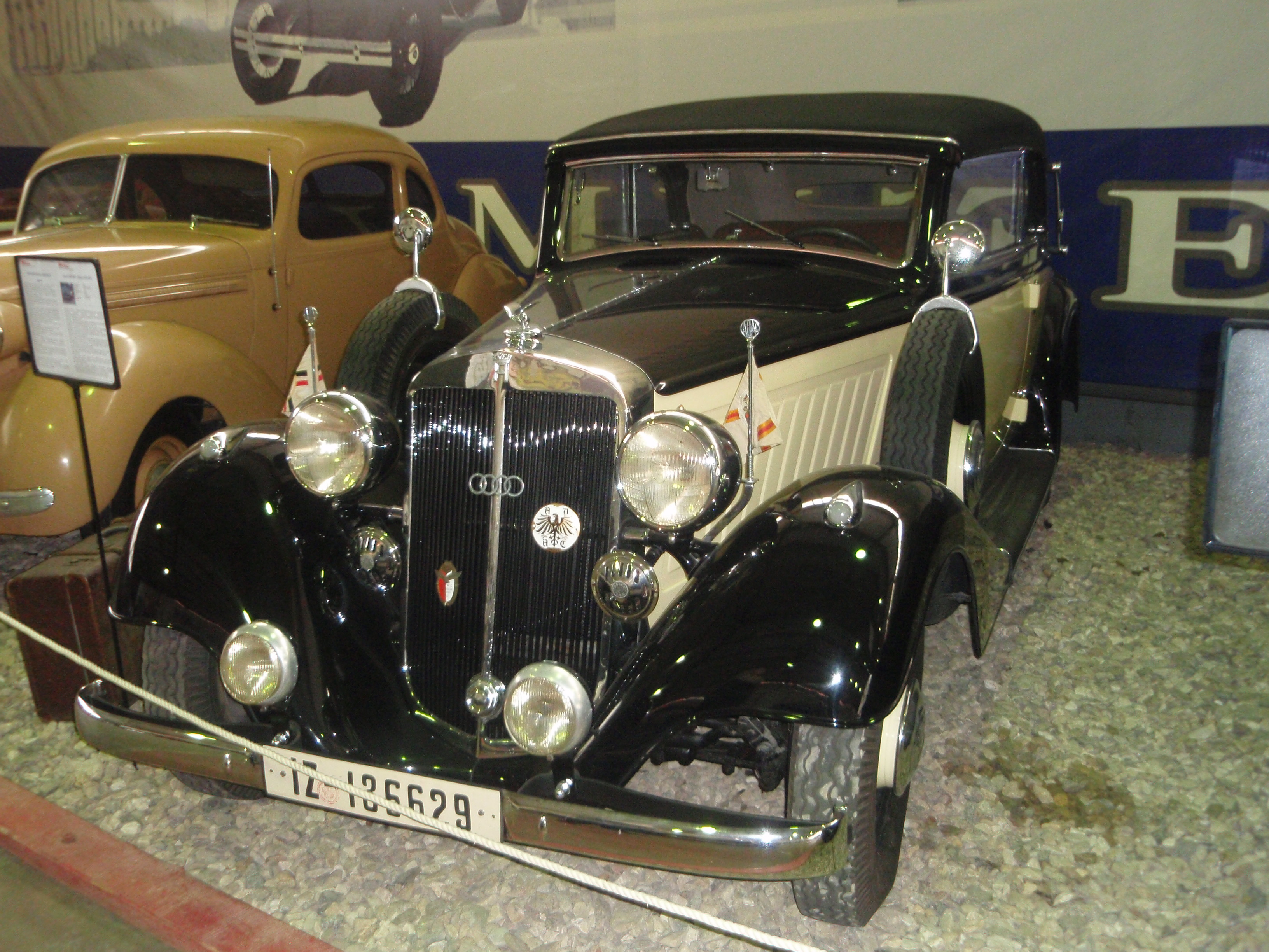 Автомобиль Horch 830 BK